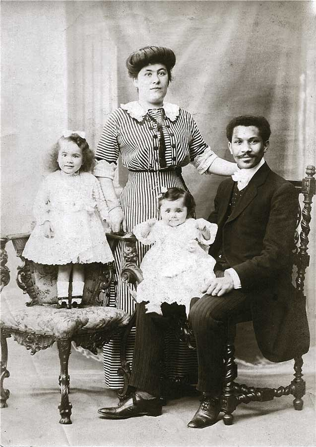 Joseph Laroche, en compagnie de sa femme et ses deux filles aînées